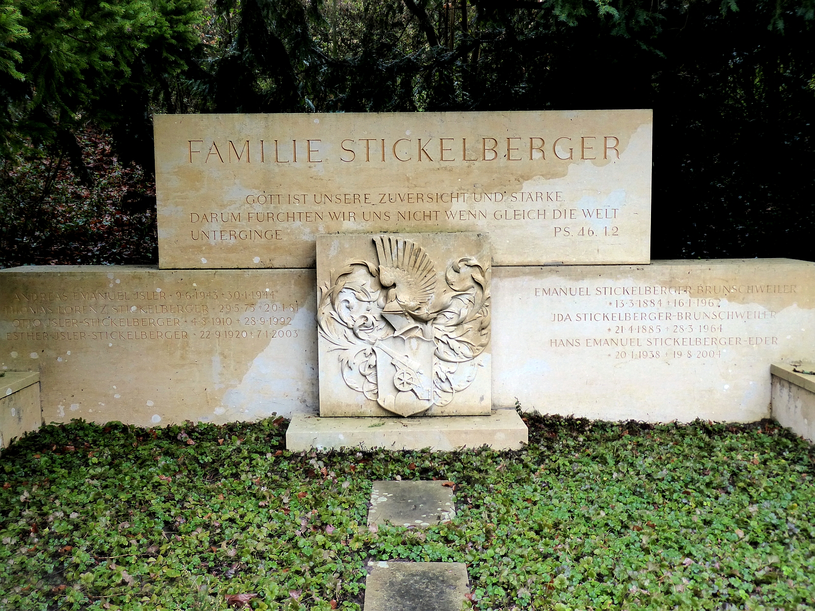 Otto Jsler-Stickelberger (1910–1992), Chemiker in der F. Hoffmann-La Roche AG, über 100 wissenschaftl. Publikationen und Patente. Ehrendoktorate der Univ. Amsterdam 1971 und Basel, Grab auf dem Friedhof Hörnli, Riehen, Basel-Stadt